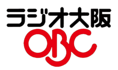 ラジオ大阪ロゴ